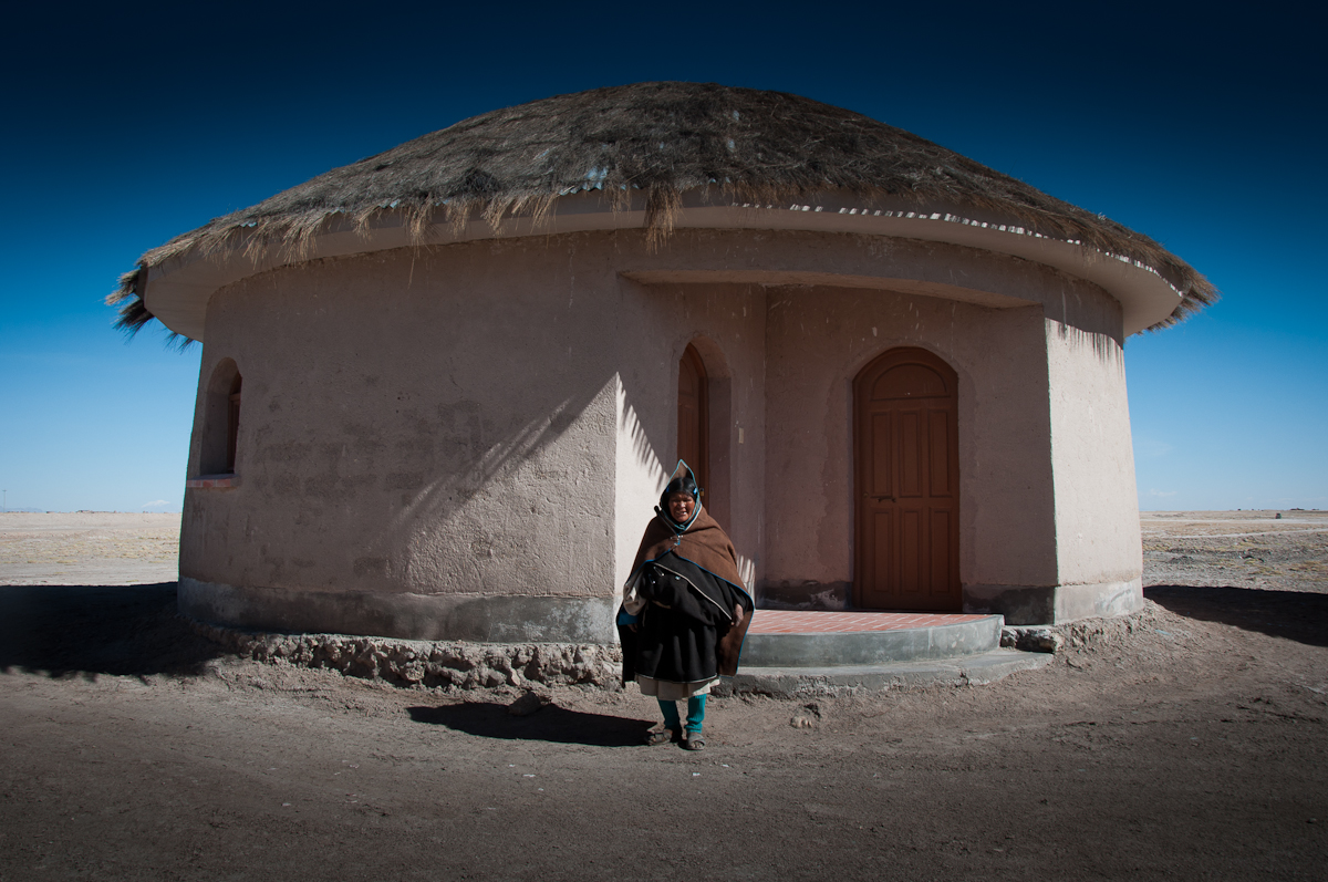 Esta foto se tomó el 4 de octubre, 2011 en Chipaya, Oruro, Bolivia, con una Nikon D90.